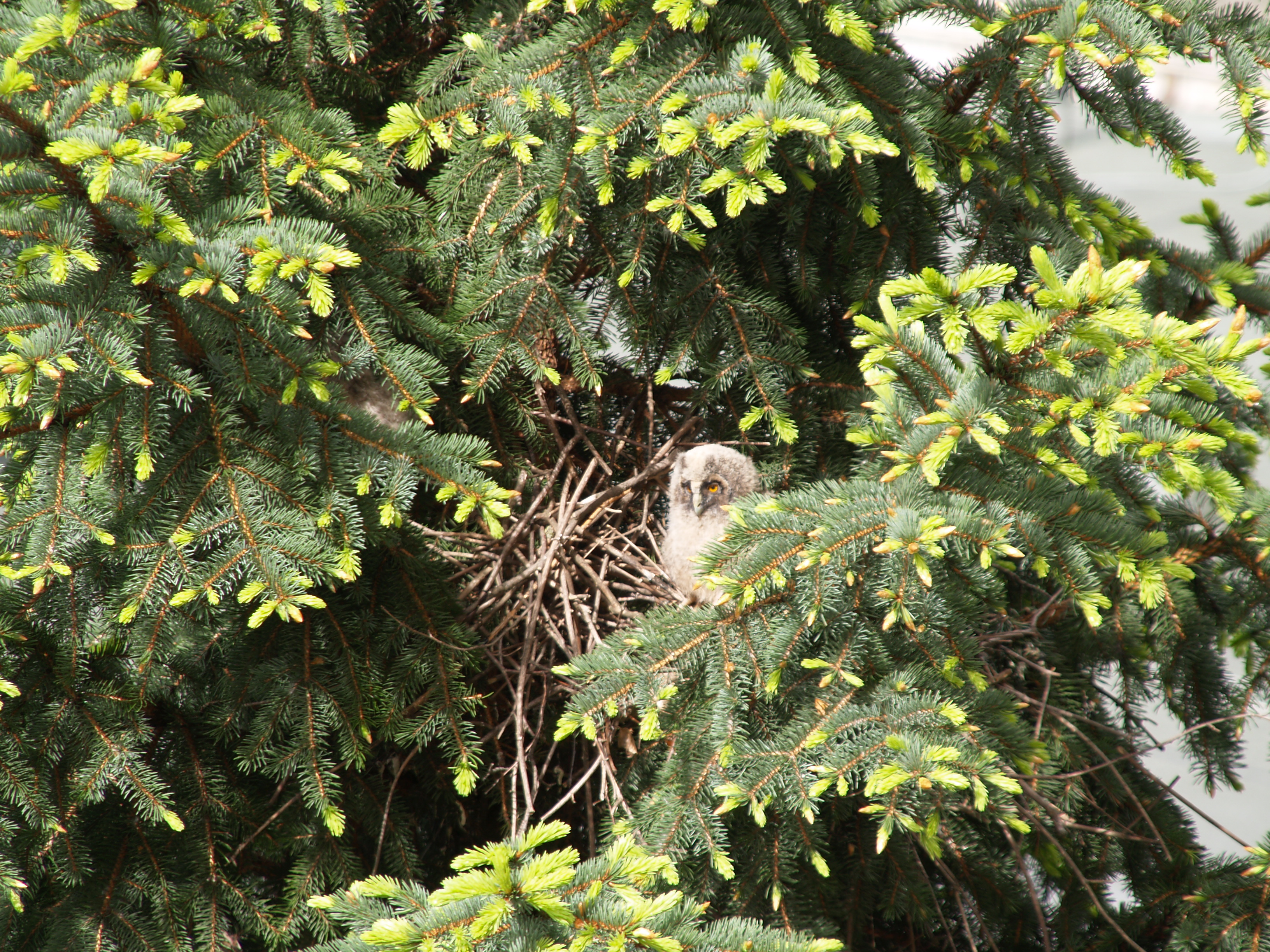 Kontrolne stanovisko